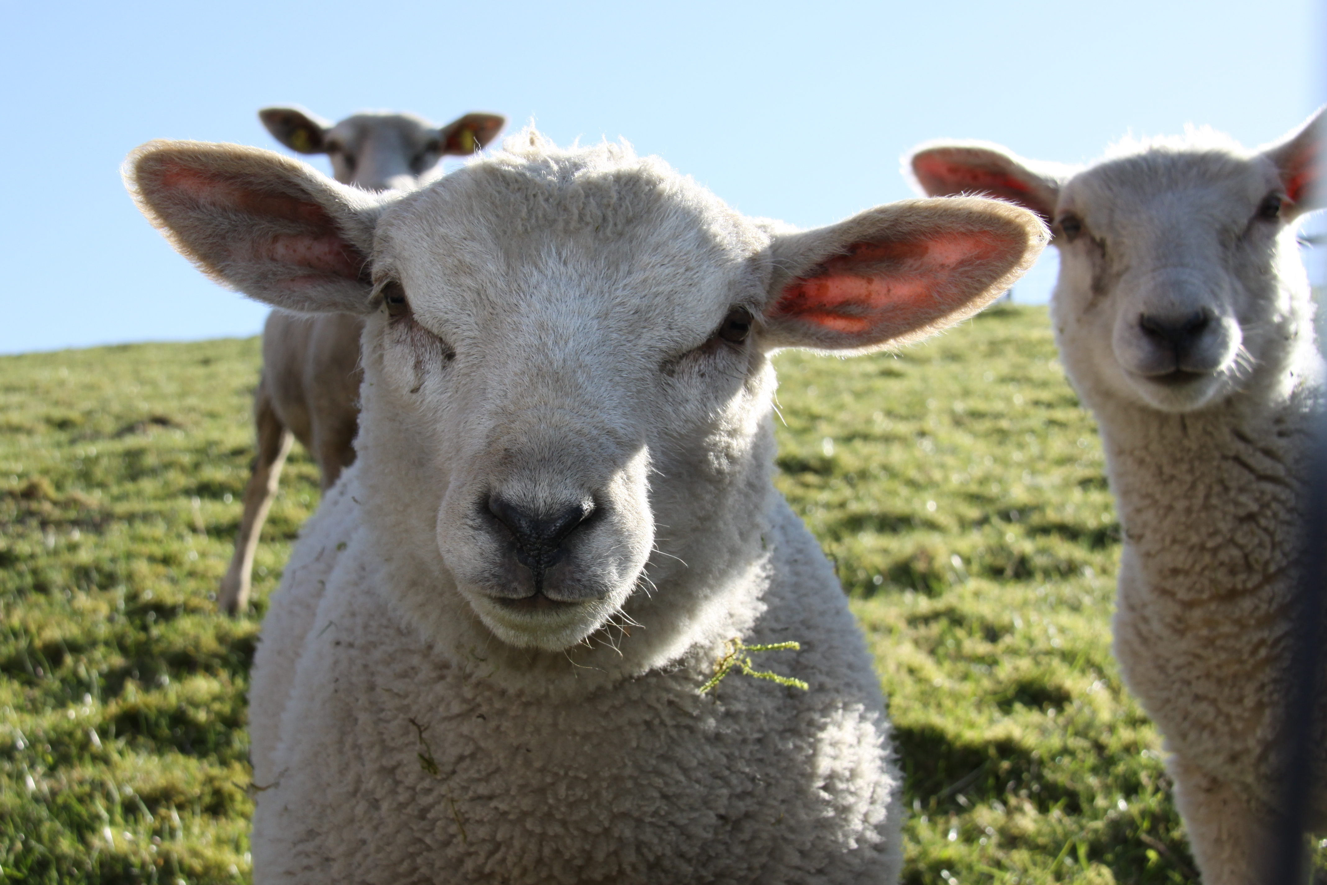 Deichschaf in Terborg